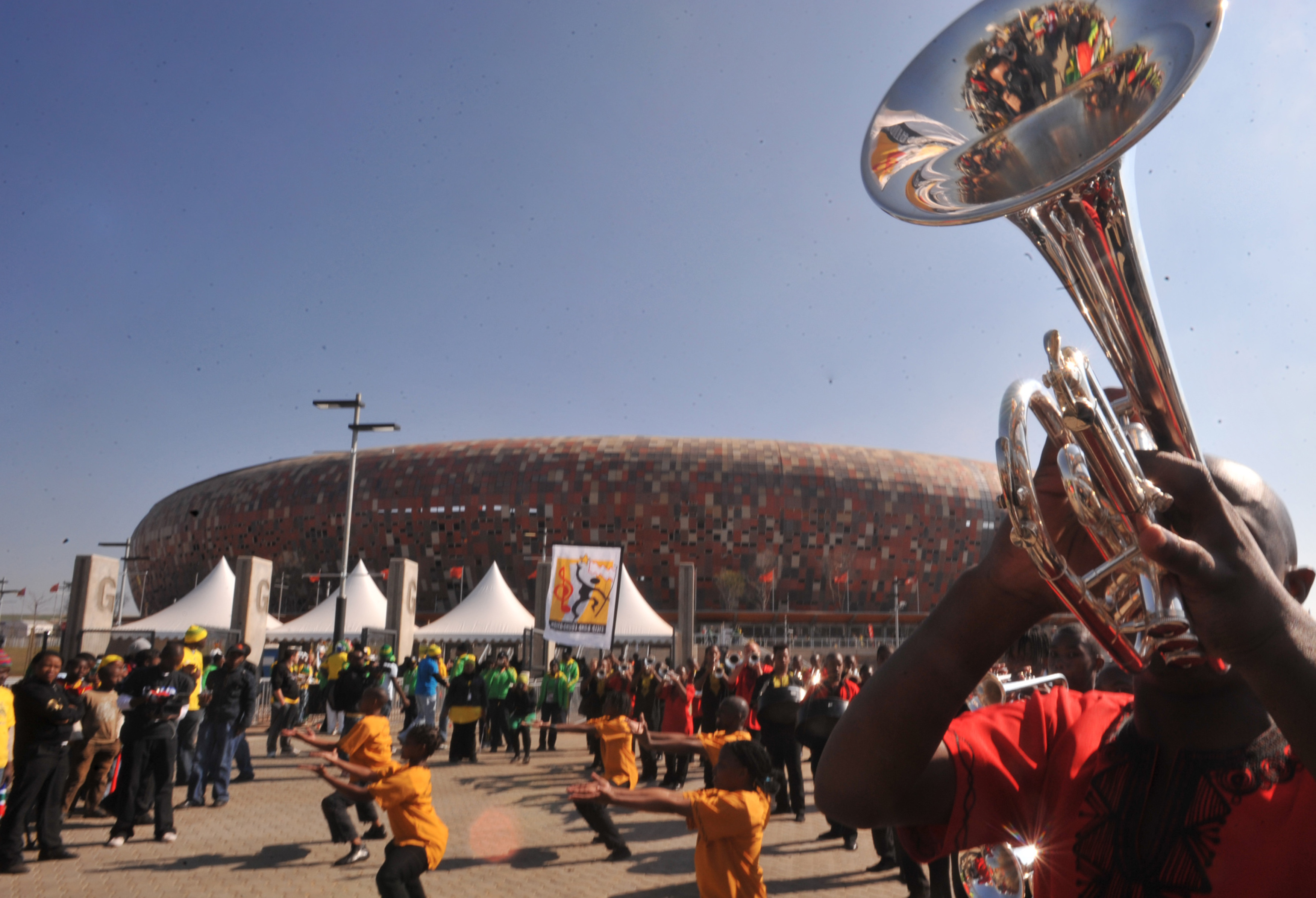 Torcedores de vários países lotam o Estádio Soccer City durante o jogo de abertura da Copa do Mundo. Fantasiados e usando camisas da África do Sul e do México, os torcedores fizeram uma festa enquanto se preparavam para entrar no estádio.